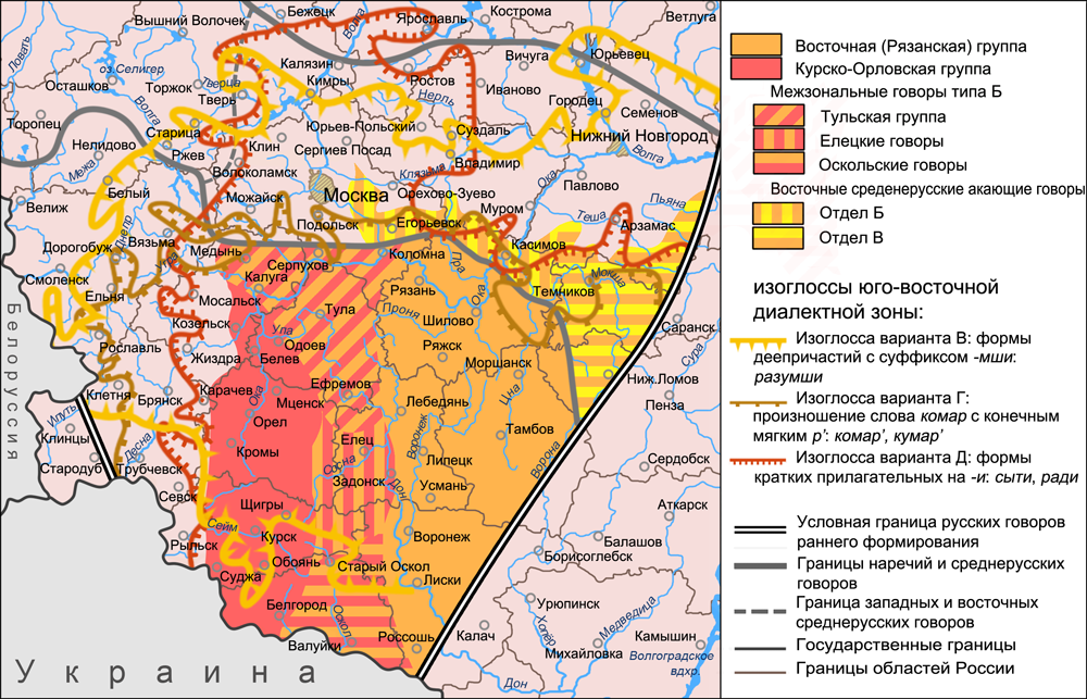 Карта Рязанской группы и соседних с ней говоров в ареалах пучков изоглосс вариантов В, Г и Д юго-восточной диалектной зоны. Источники: Захарова К. Ф., Орлова В. Г. Диалектное членение русского языка — 2-е изд. — М.: Едиториал УРСС, 2004. — ISBN 5-354-00917-0, приложение: Диалектологическая карта русского языка (1964 г.). Касаткин Л. Л. Русские диалекты. Лингвистическая география Русские. Монография Института этнологии и антропологии РАН — М.: Наука, 1999, с. 96. Захарова К. Ф., Орлова В. Г. Диалектное членение русского языка — 2-е изд. — М.: Едиториал УРСС, 2004. — ISBN 5-354-00917-0, с. 103—104. Бромлей С. В., Булатова Л. Н., Захарова К. Ф. и др. Русская диалектология / Под ред. Л. Л. Касаткина — 2-е изд., перераб. — М.: Просвещение, 1989. — ISBN 5-09-000870-1, с. 205